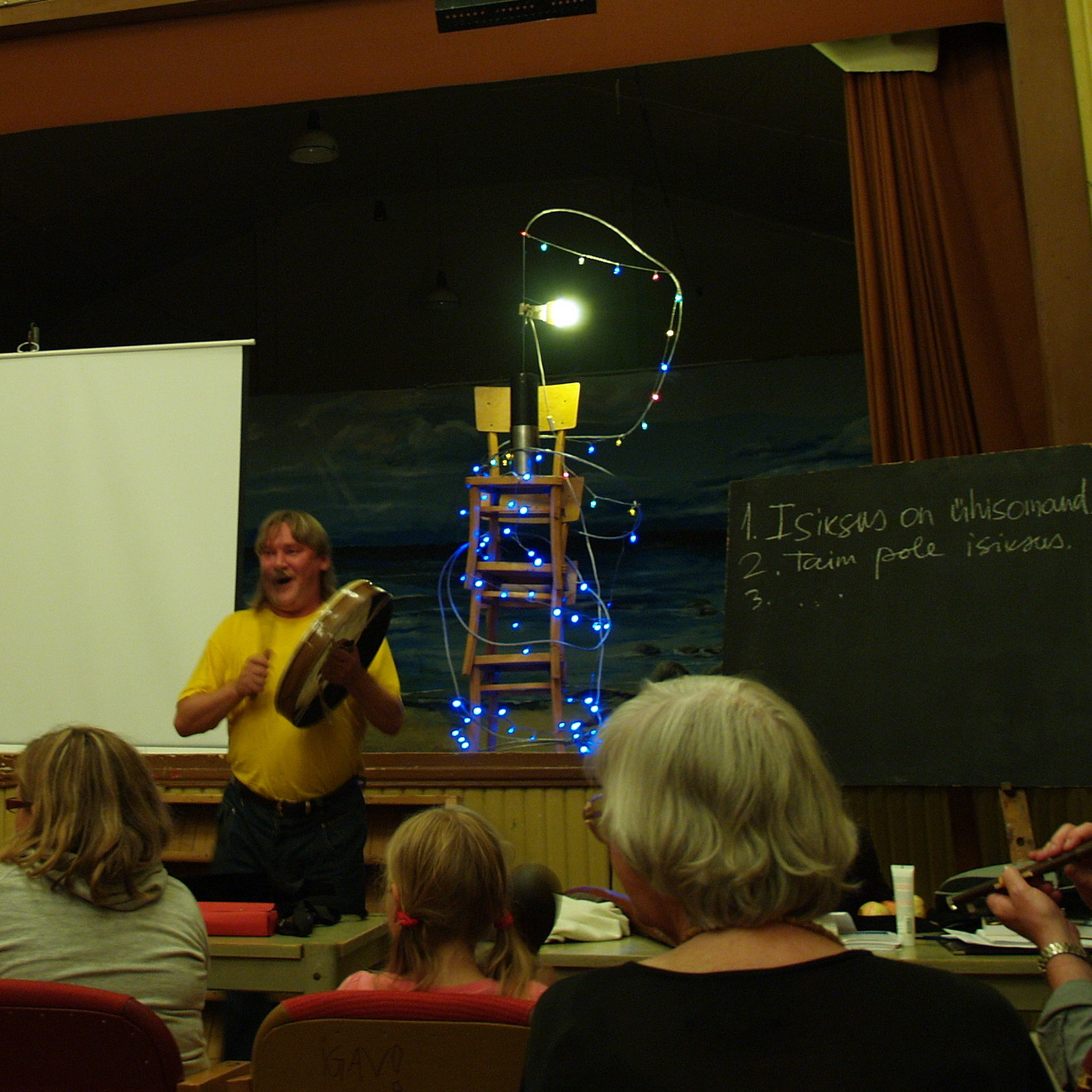 Urmas Sisask teadus.ee suvekoolis.